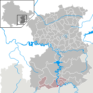 Blankenstein in Thuringia - Saale-Orla-Kreis